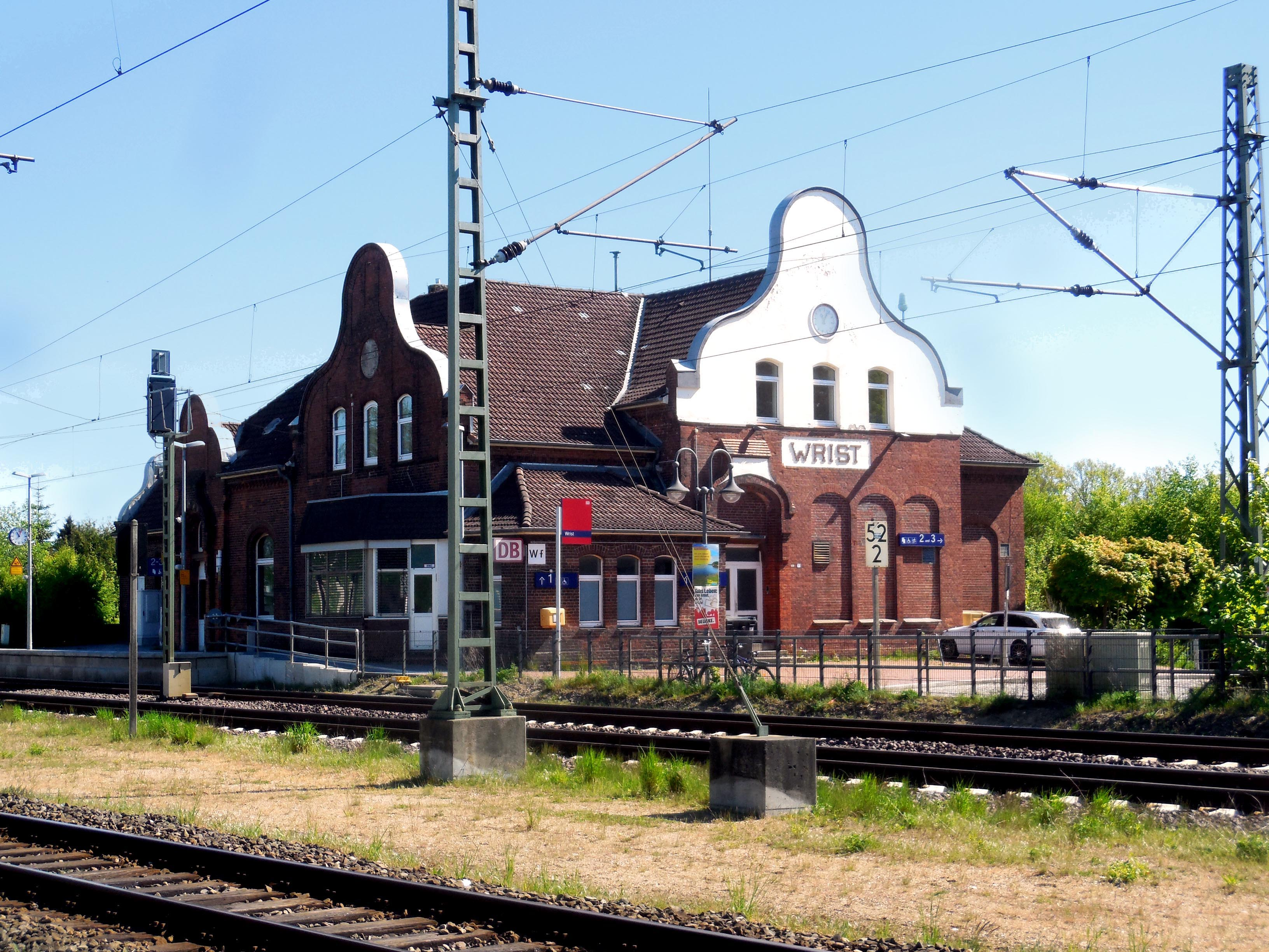 Wrist, Bahnhofsgebäude Südseite